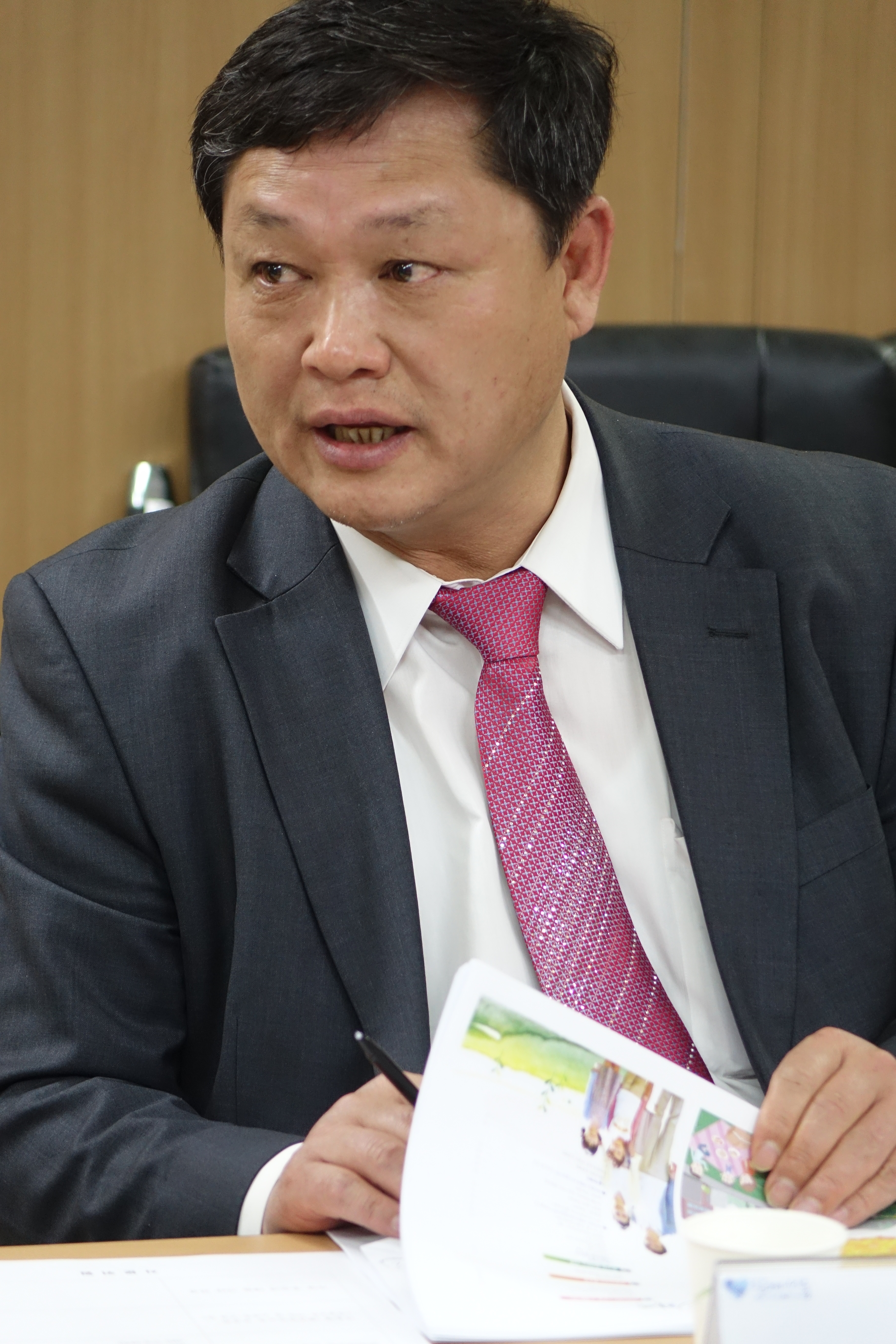 길병옥, 2015년 4월 서울특별시 중구 서울소방재난본부 시민안전파수꾼 자문위원 회의